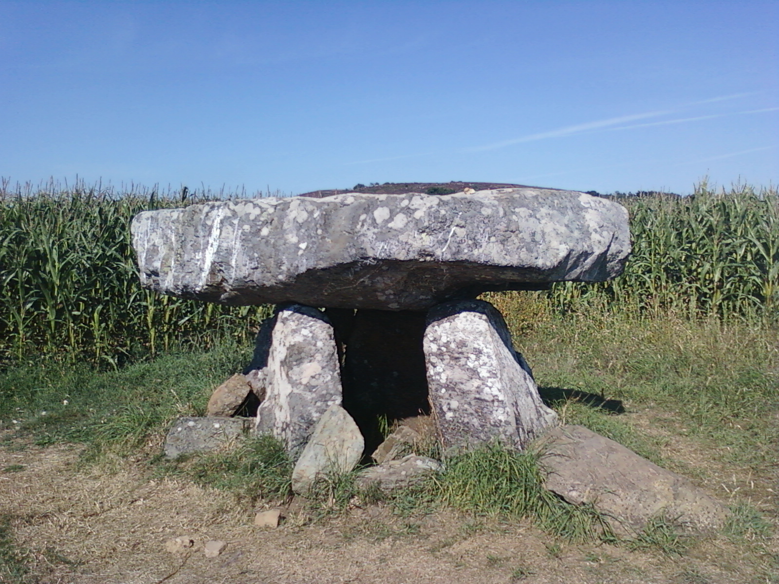 Dolmen situé sur la commune de Saint-Nic